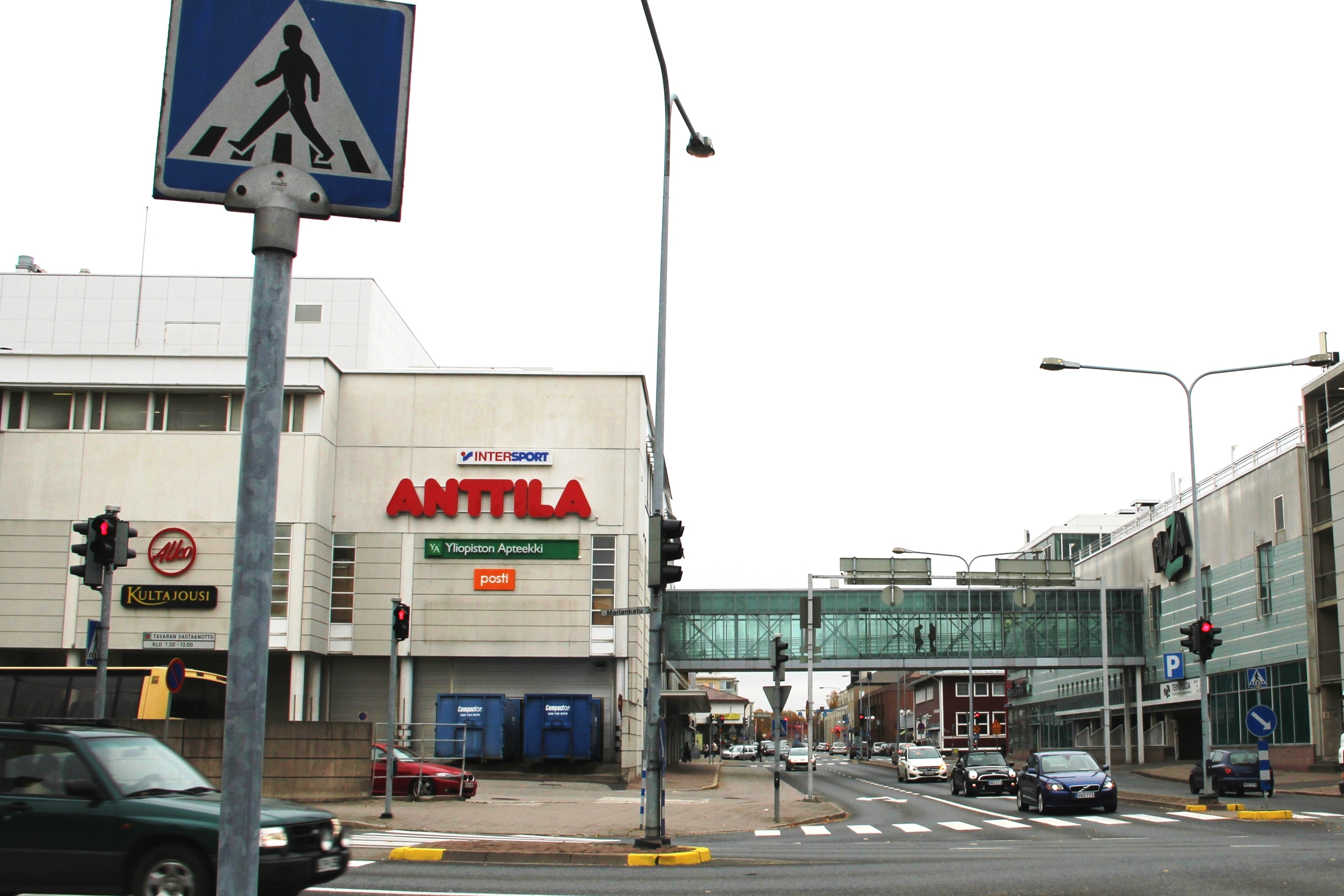 Kuvattu lokakuussa 2016, kun Anttila oli jo asetettu konkurssiin ja tavaratalojen lopetus oli meneillään.